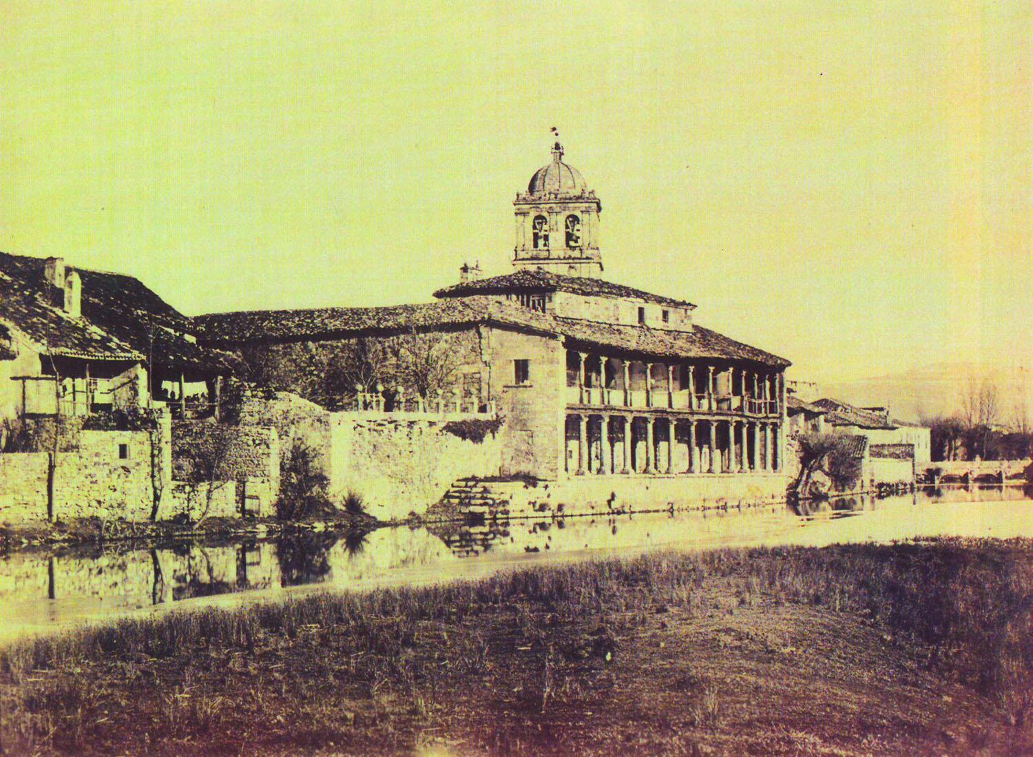 Positivo sobre cartulina - reportaje fotográfico sobre la construcción del ferrocarril de Santander a Alar del Rey (Palencia)